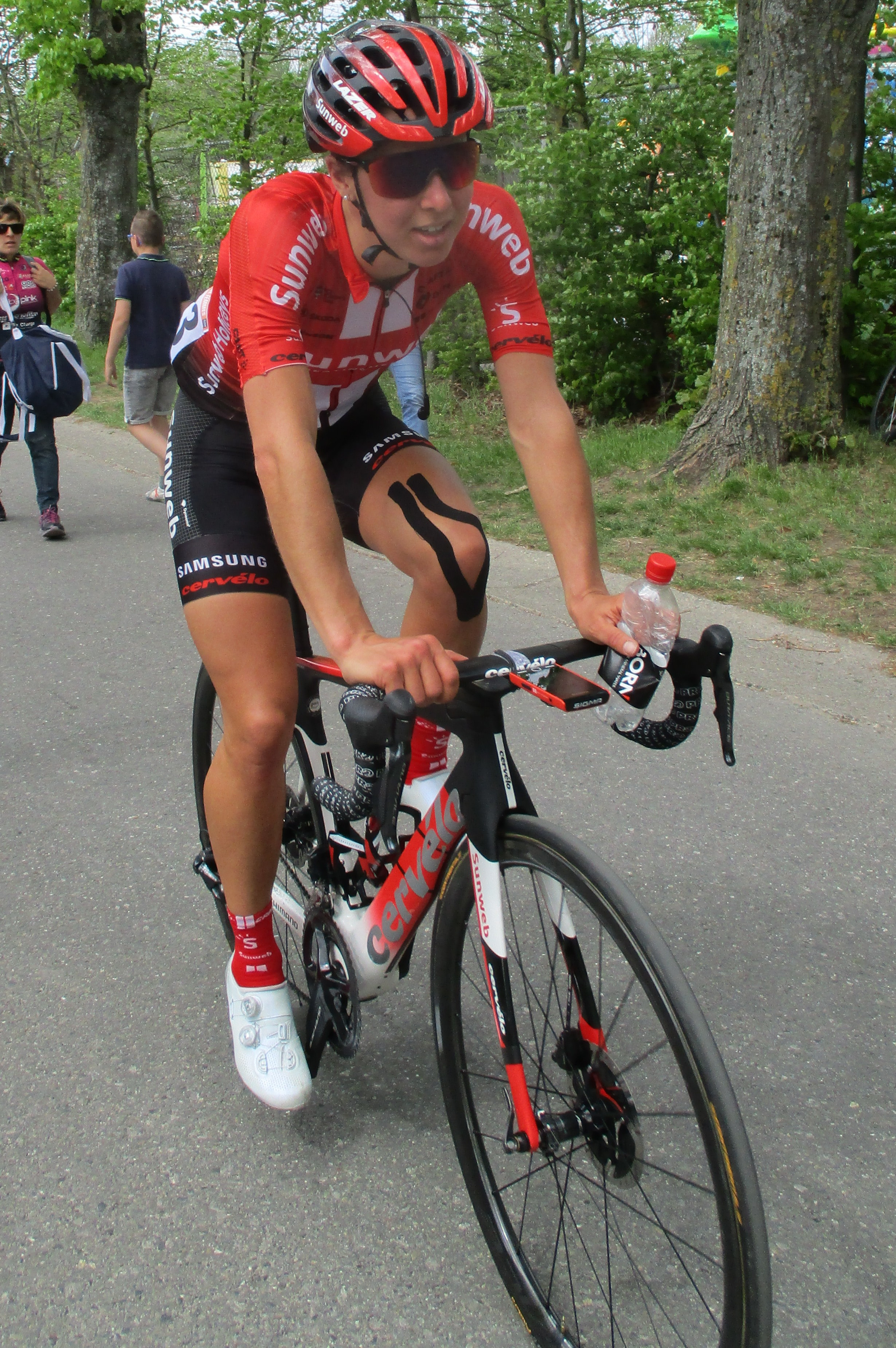 Finish van de Waalse Pijl 2019 voor vrouwen op de Mur de Huy